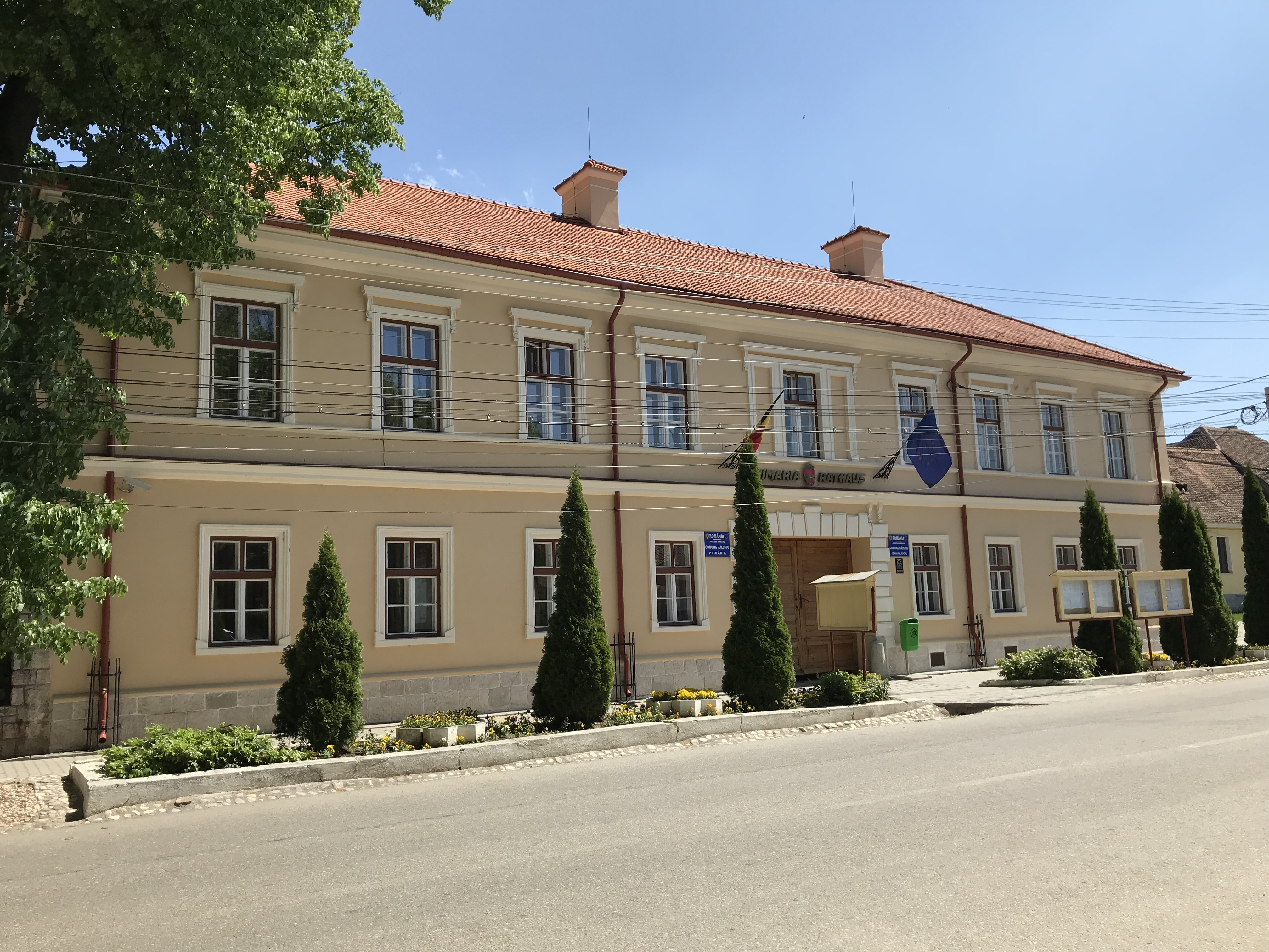 Primărie, sat Hălchiu, comuna Hălchiu